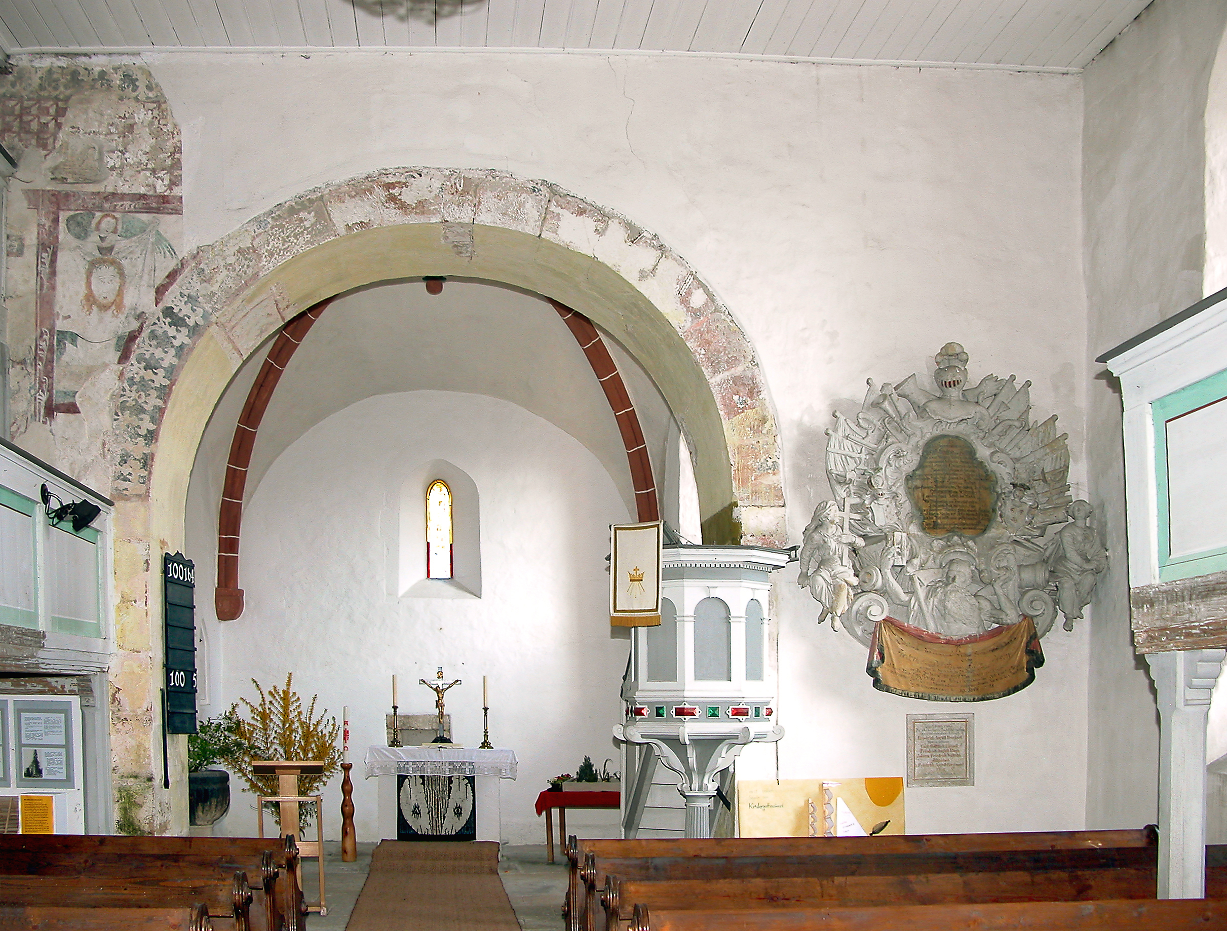 21.04.2007 01796 Struppen: Evangelische Kirche KleinStruppen, Kirchberg. Ersterwähnung Struppens war 1275, da stand die vom Deutschritterorden erbaute romanische Kirche schon. Heutige Kirche von 1740. [DSCN22085.TIF]20070421375.JPG(c)Blobelt